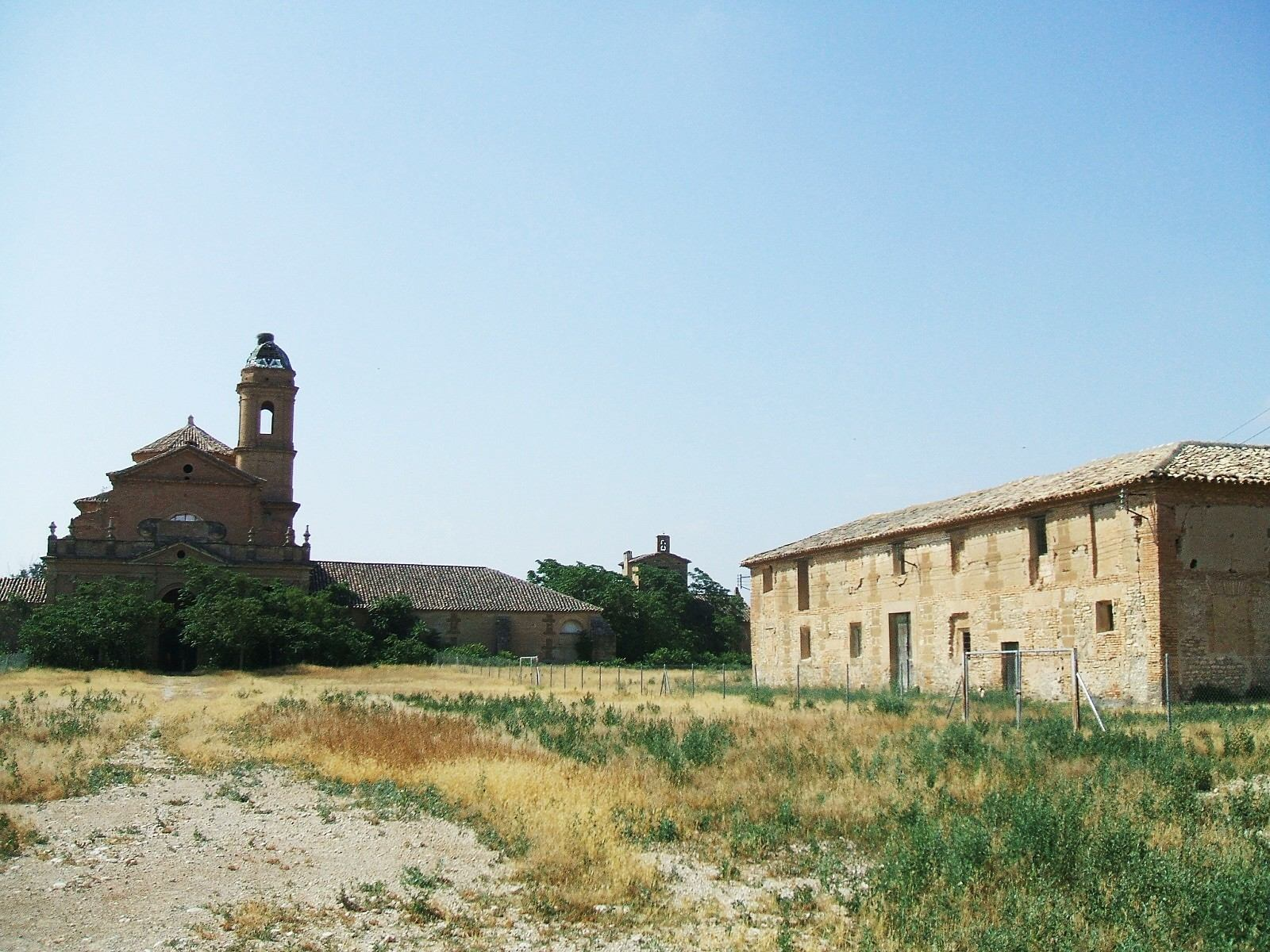 Cartuja de Nuestra Señora de las Fuentes (Cartuja de Monegros), en el término municipal de Sariñena, Huesca, Aragón, España.